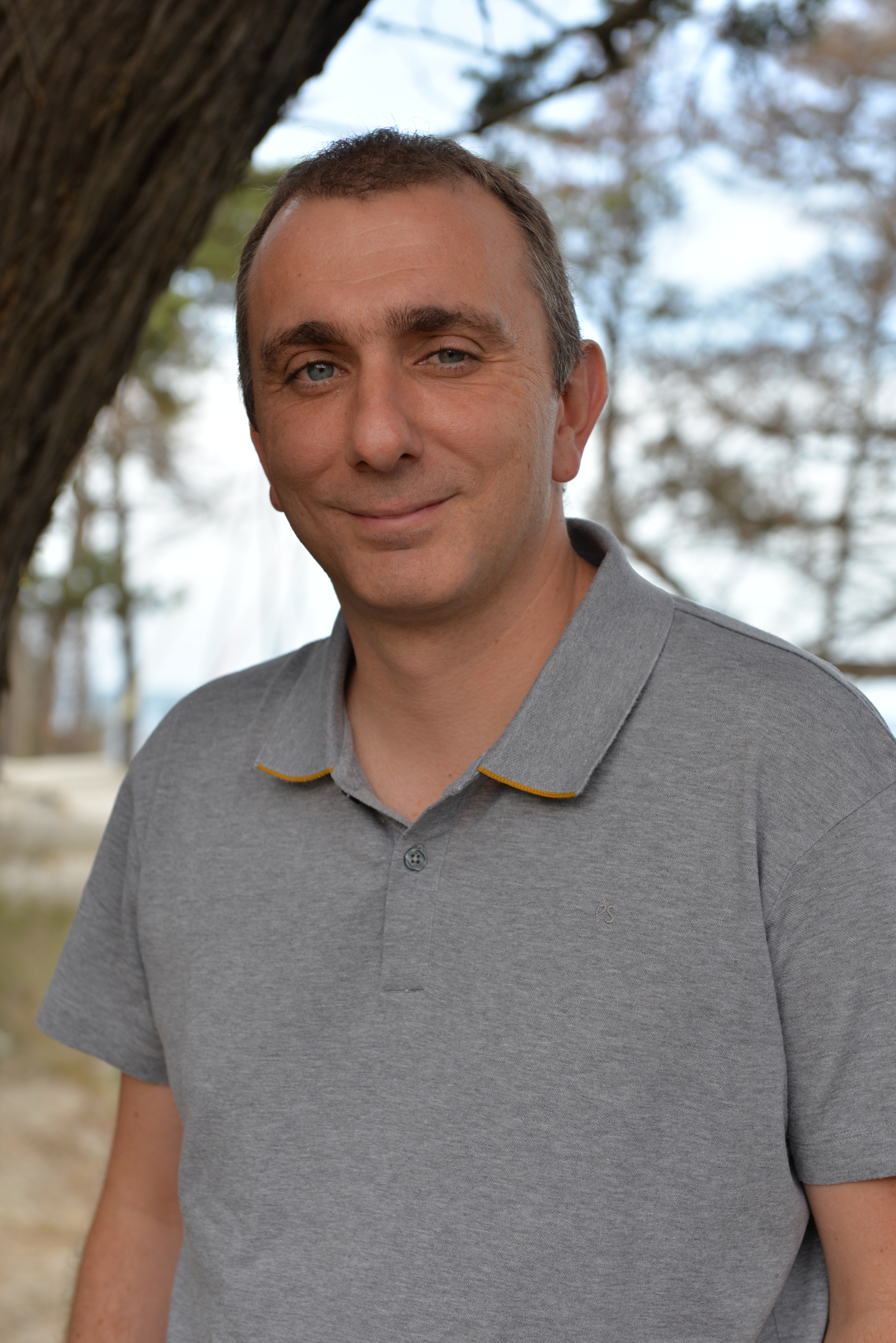 Jean-Christophe Angelini lors de l'Université d'été de Régions et Peuples Solidaires en Corse en août 2014.